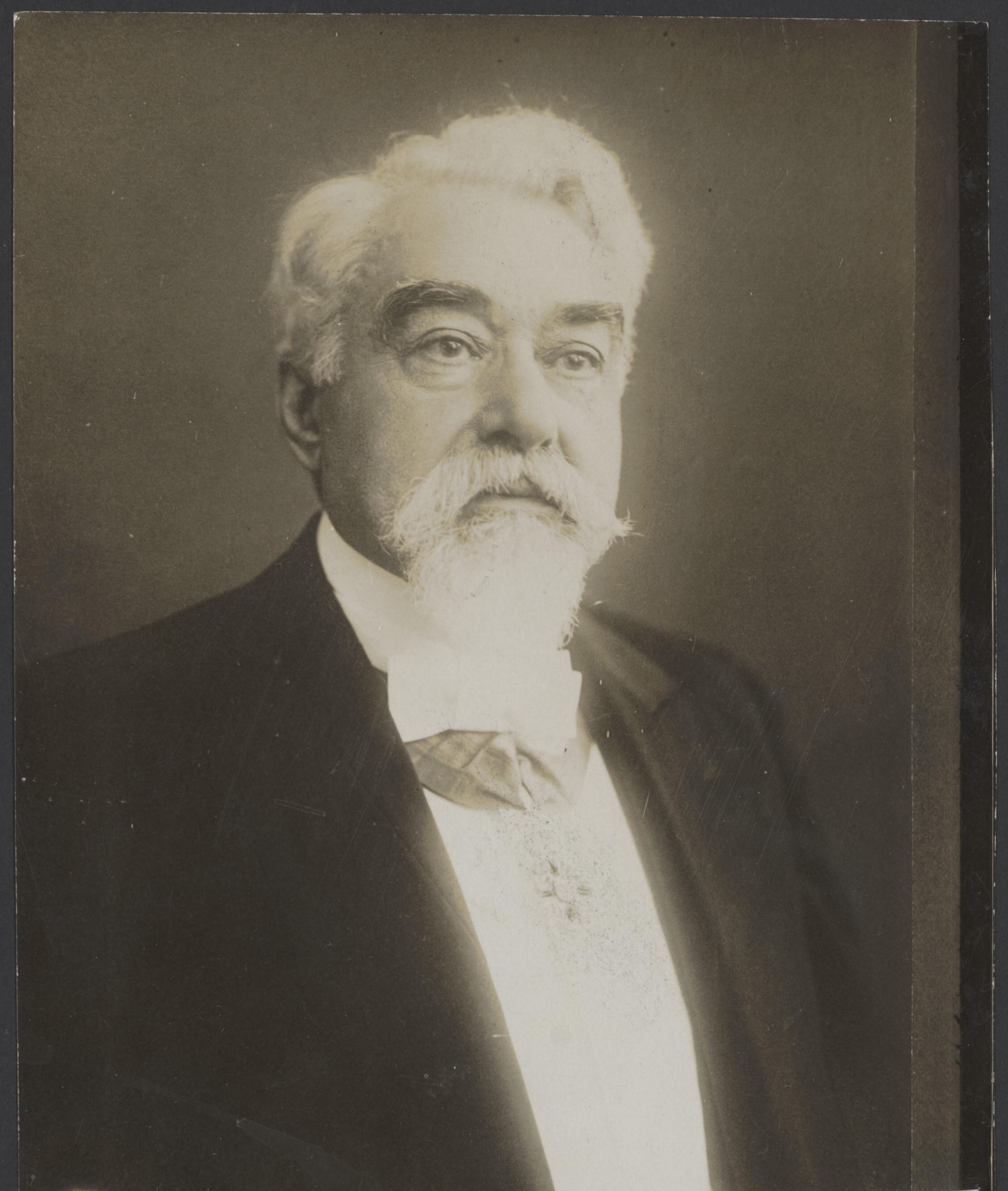 J. Oppenheim, lid van de Raad van State (1907-1924)